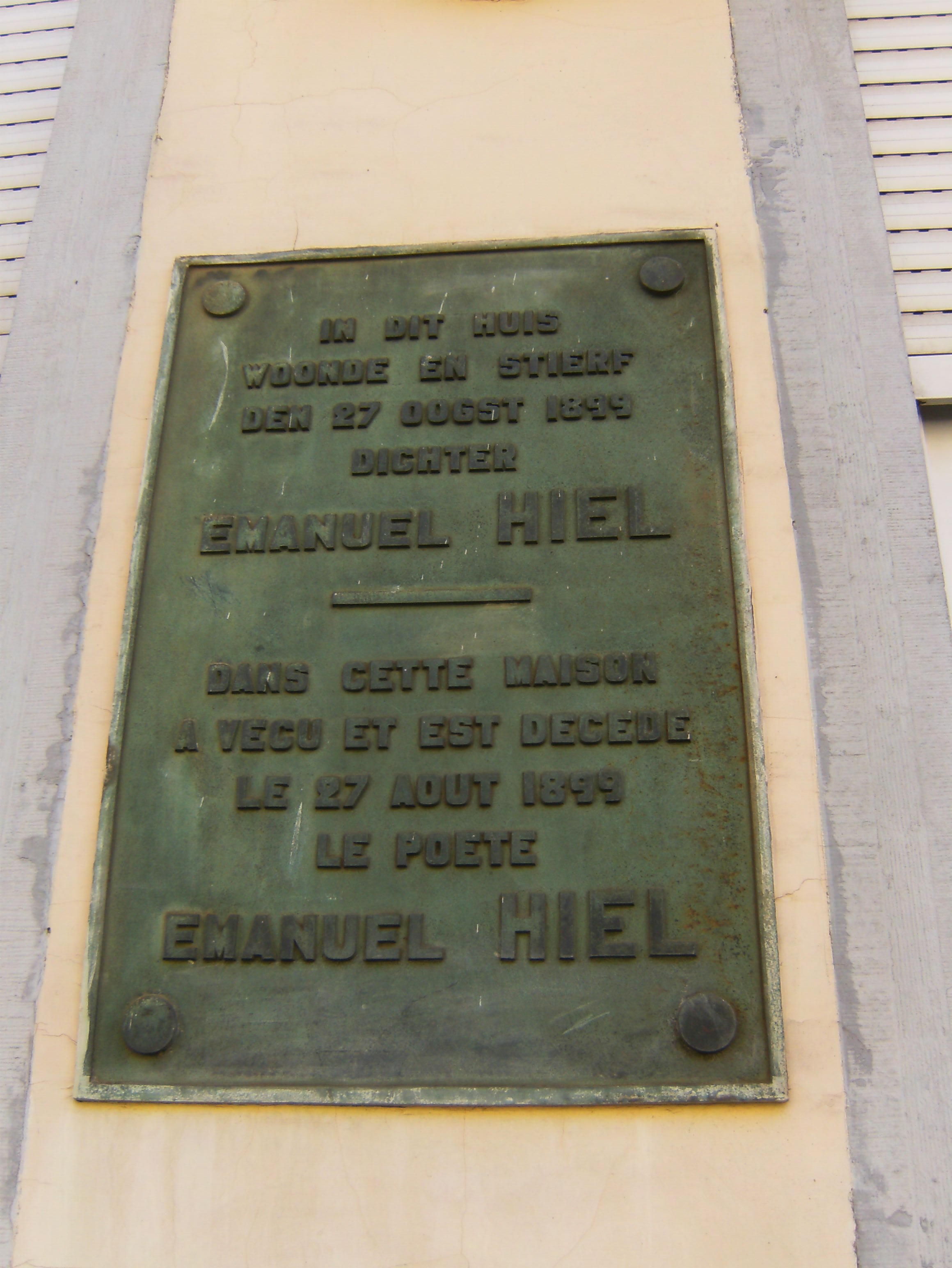 plaque commémorative sur la maison natale d'Emmanuel Hiel à Schaerbeek